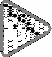 Diagrama creado inicialmente para el artículo de Wikipedia sobre el juego de tablero Y. Una alternativa es hacerlo mediante texto igualmente espaciado como en la Wikipedia inglesa. Untrozo 12:39 2 may, 2004 (CEST)